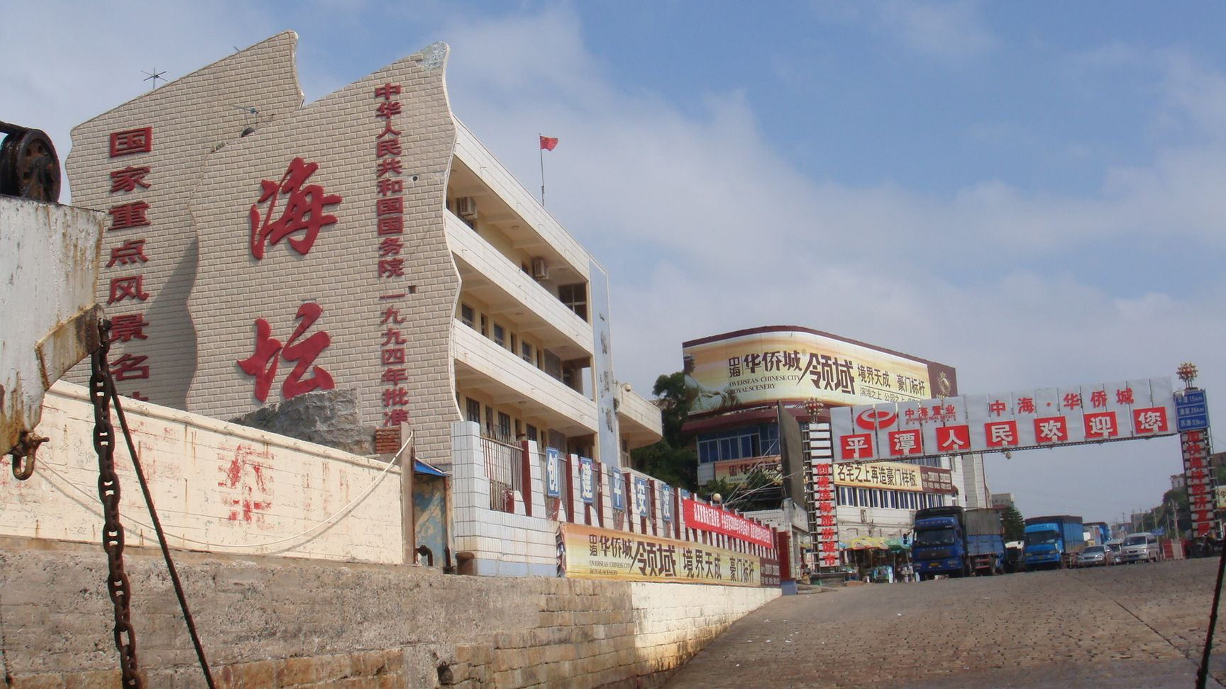 平潭娘宫码头 - Nianggong Ferry Terminal - 2009.10